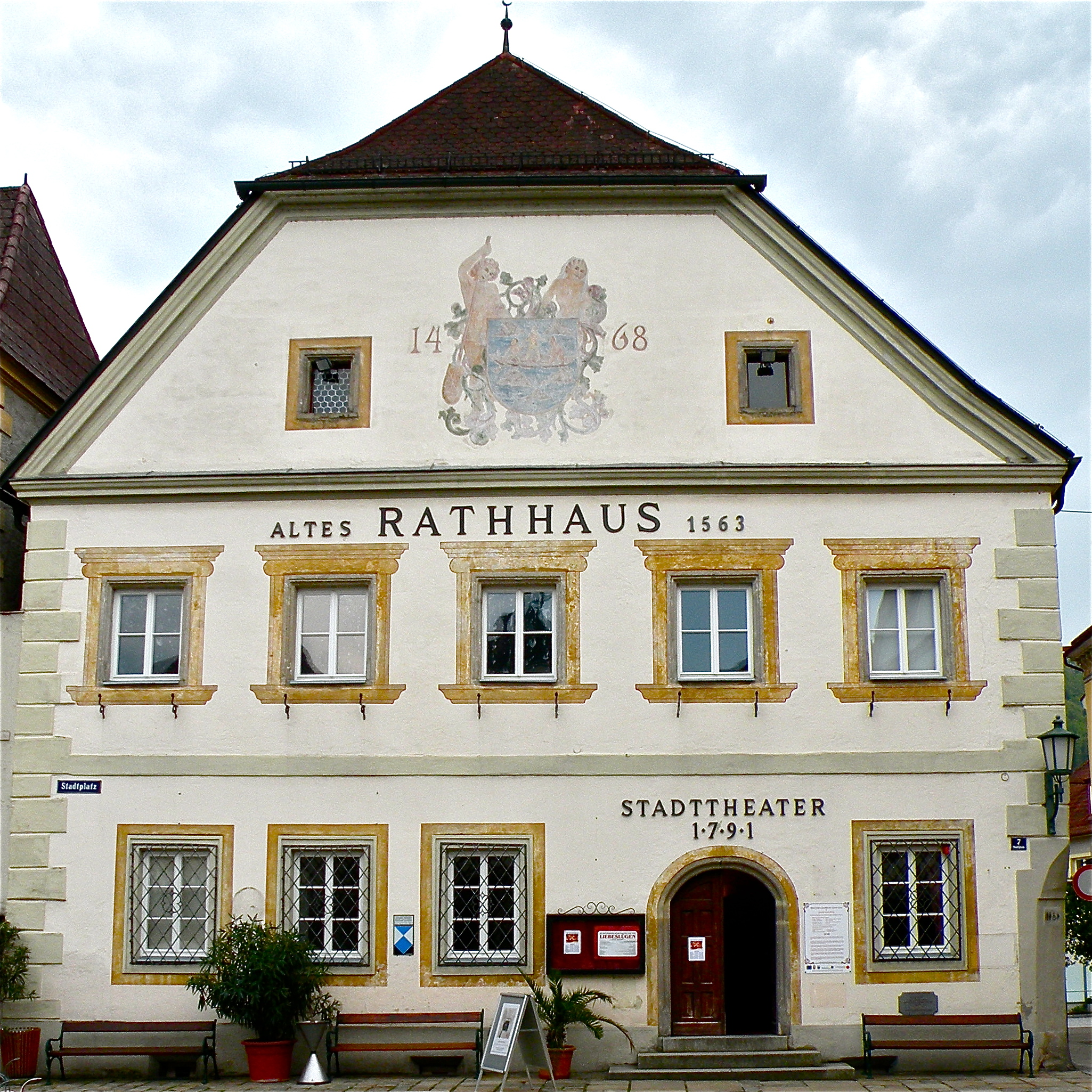 Altes Rathaus und Stadttheater der Stadt Grein im Bezirk Perg in Oberösterreich